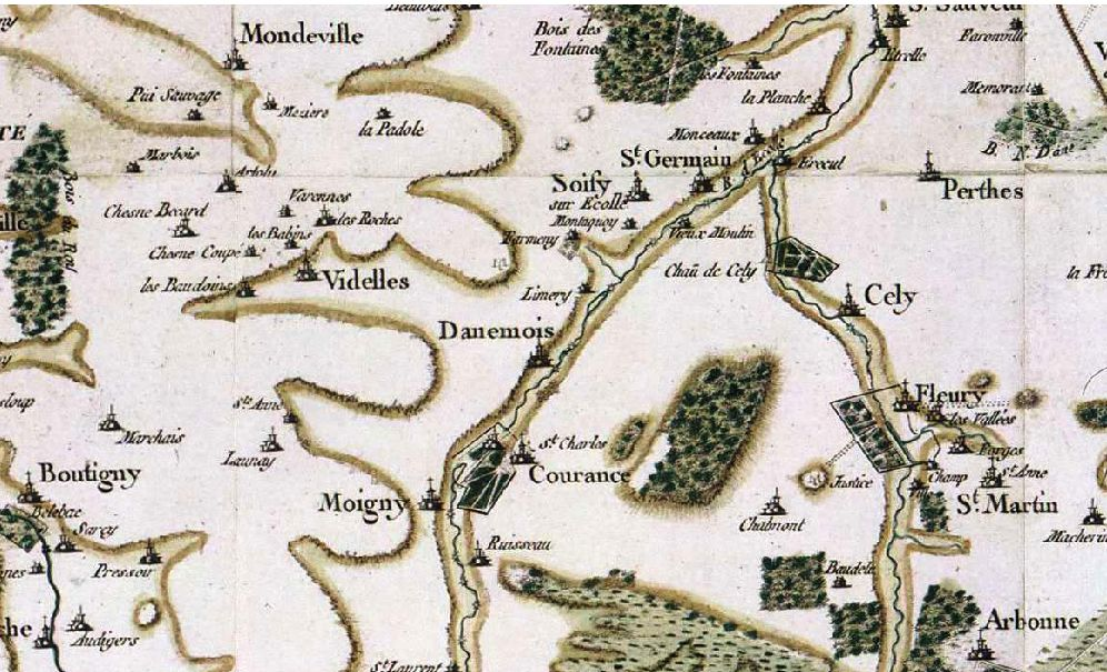 Image de la carte de Cassini de la région de Dannemois